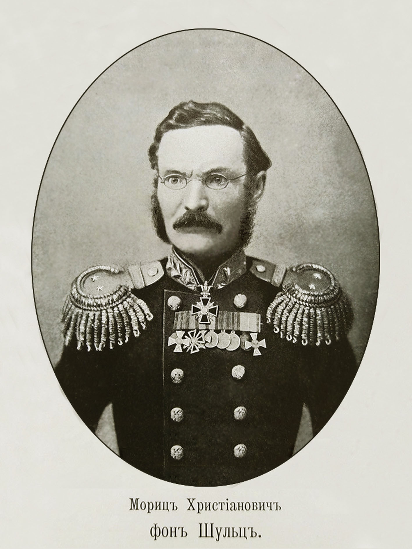 Генерал от кавалерии Мориц Христианович Шульц